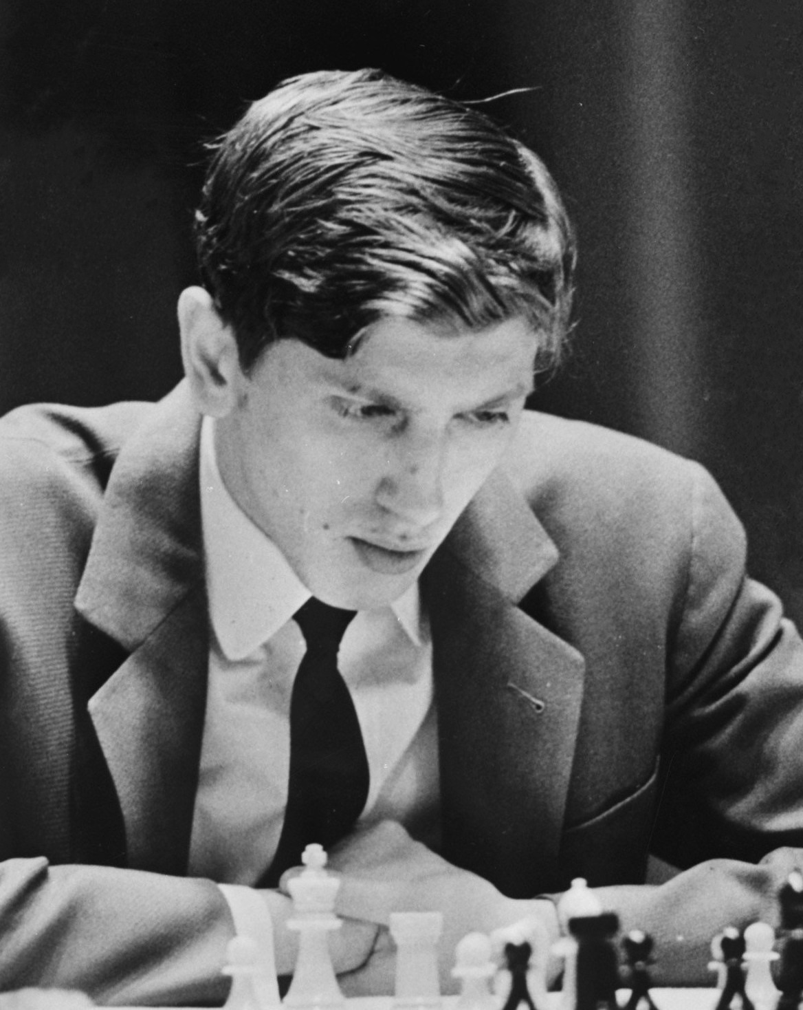 Collectie / Archief : Fotocollectie Anefo Reportage / Serie : [ onbekend ] Beschrijving : Schaker Bobby Fisher aan bord (archief) Datum : 15 juli 1971 Trefwoorden : schakers Persoonsnaam : Fisher, Bobby Fotograaf : Fotograaf Onbekend / Anefo Auteursrechthebbende : Nationaal Archief Materiaalsoort : Negatief (zwart/wit) Nummer archiefinventaris : bekijk toegang 2.24.01.04 Bestanddeelnummer : 924-7362